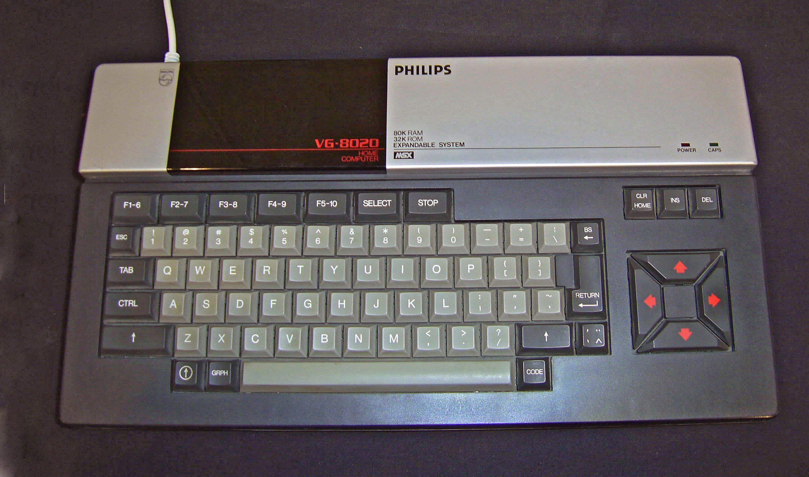 Ordenador doméstico Philips VG 8020 MSX en la RetroEuskal 2006